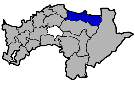 KaurJmeb為編輯臺灣省嘉義縣梅山鄉，於2005年2月10日所繪。